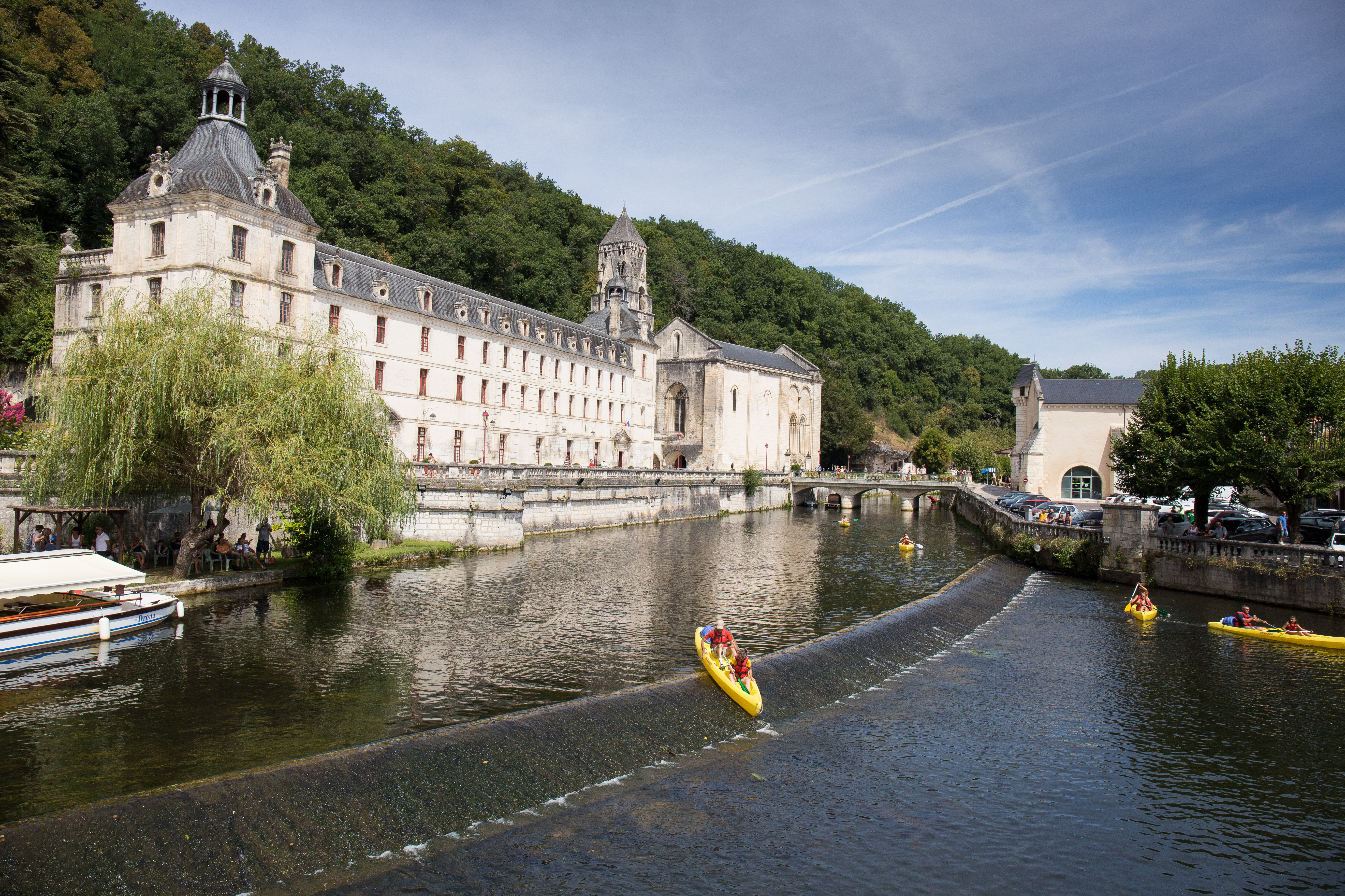 La Dronne à Brantôme